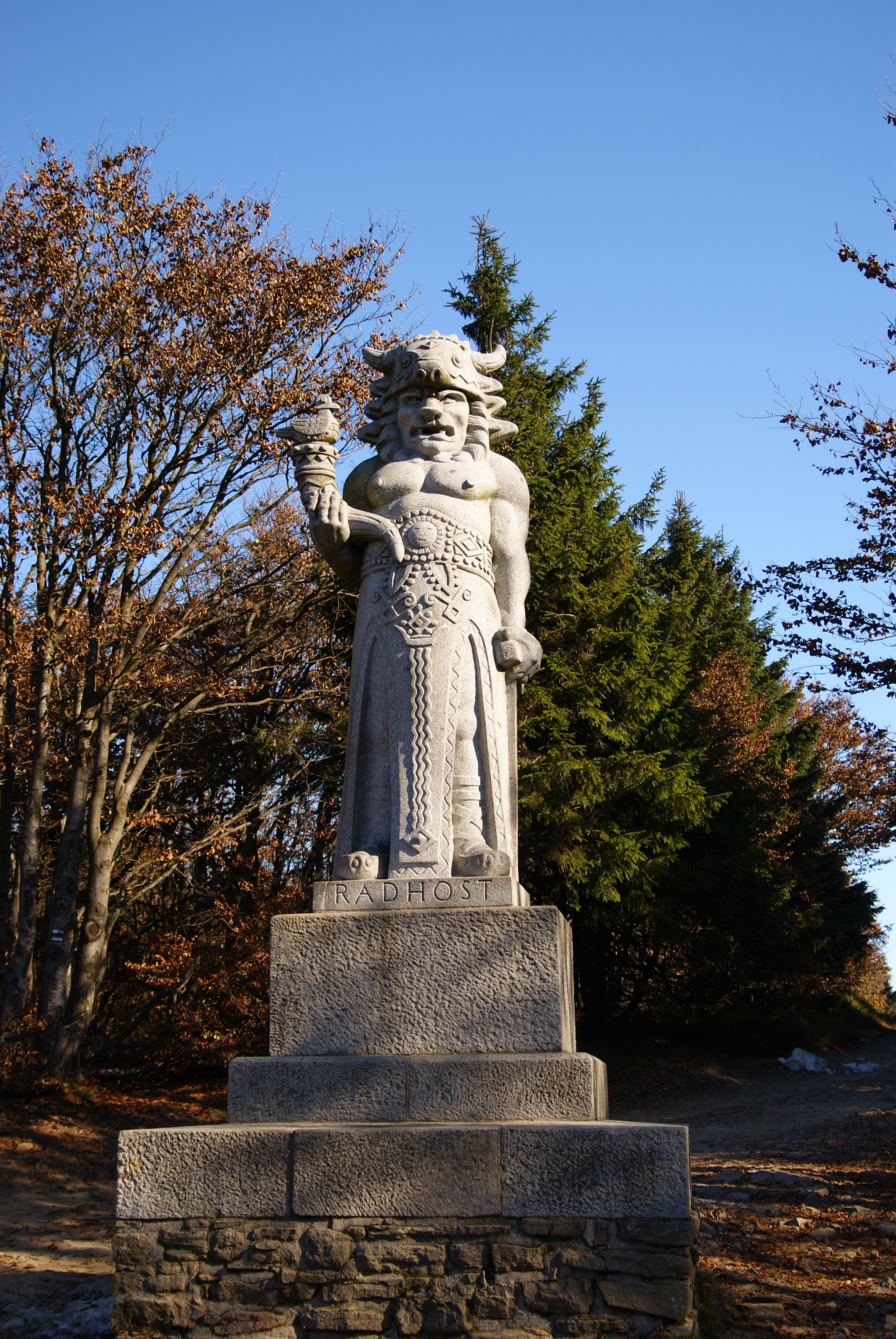 Socha Radegasta (Dolní Bečva), cesta z Pusteven na Radhošť, Dolní Bečva